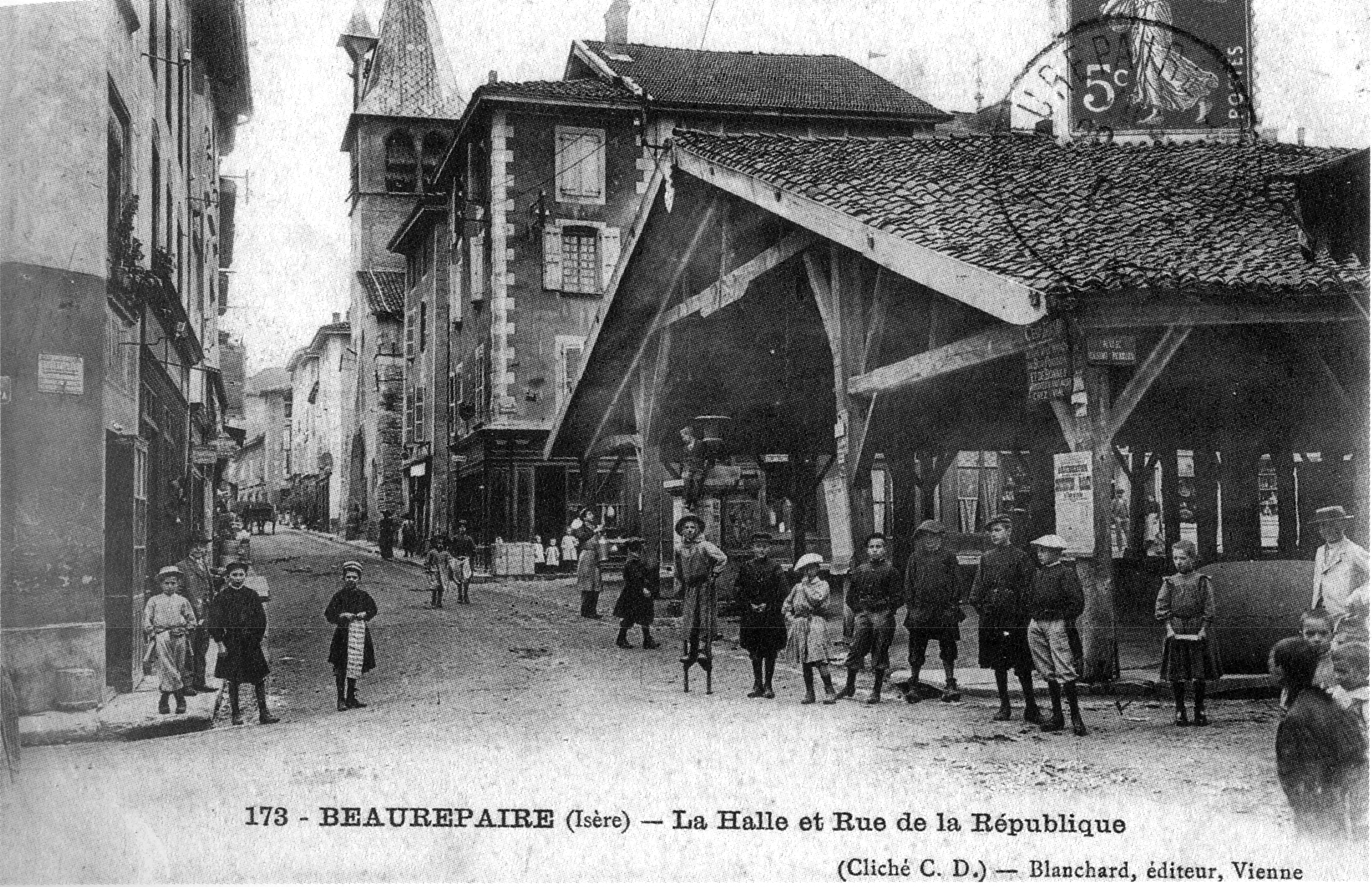 Beaurepaire, la halle et rue de la république